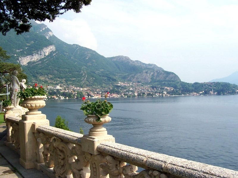 Lenno - Lago di Como visto da Villa del Balbianello